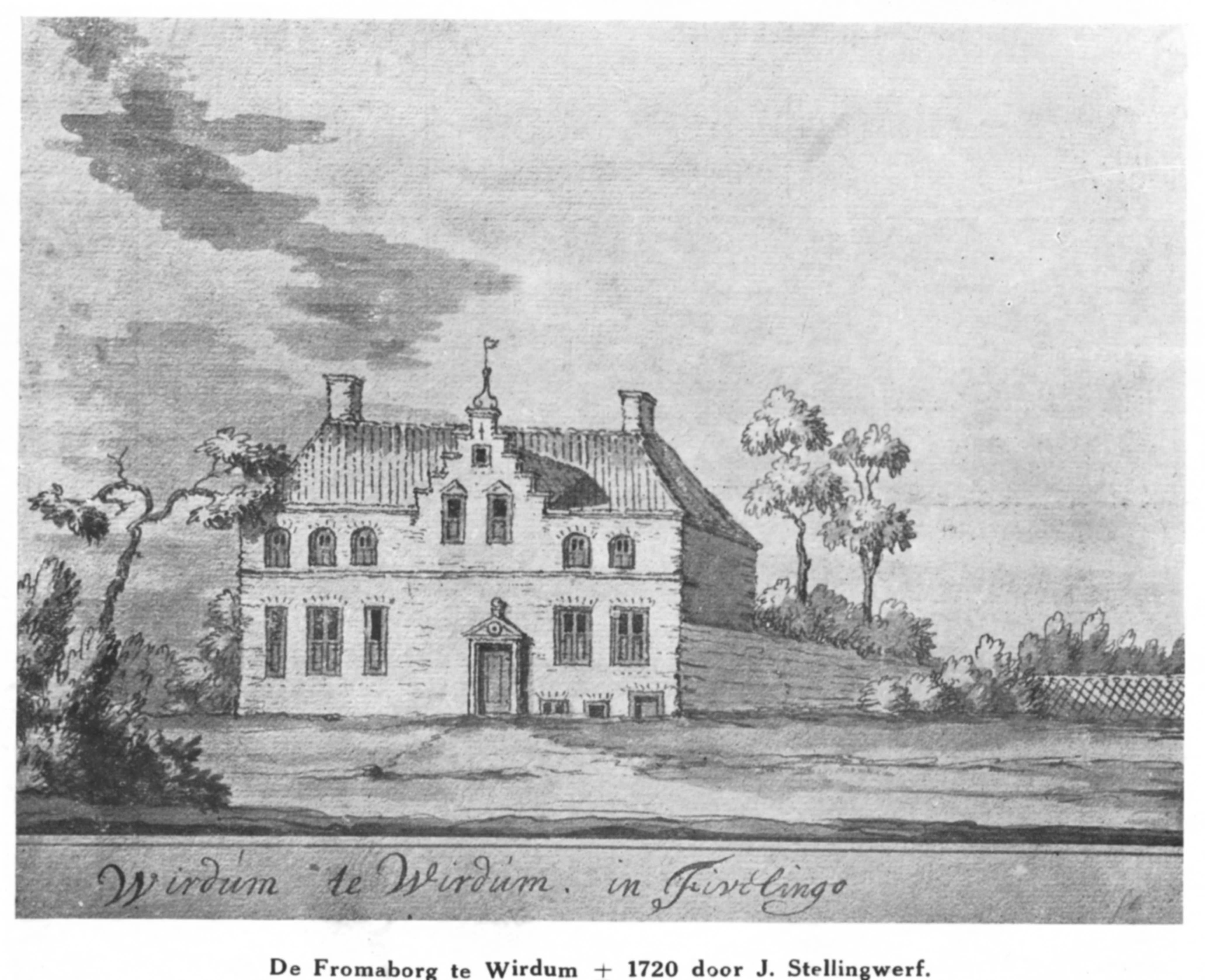 Froma-Borgte Wirdum (GN), anno 1720